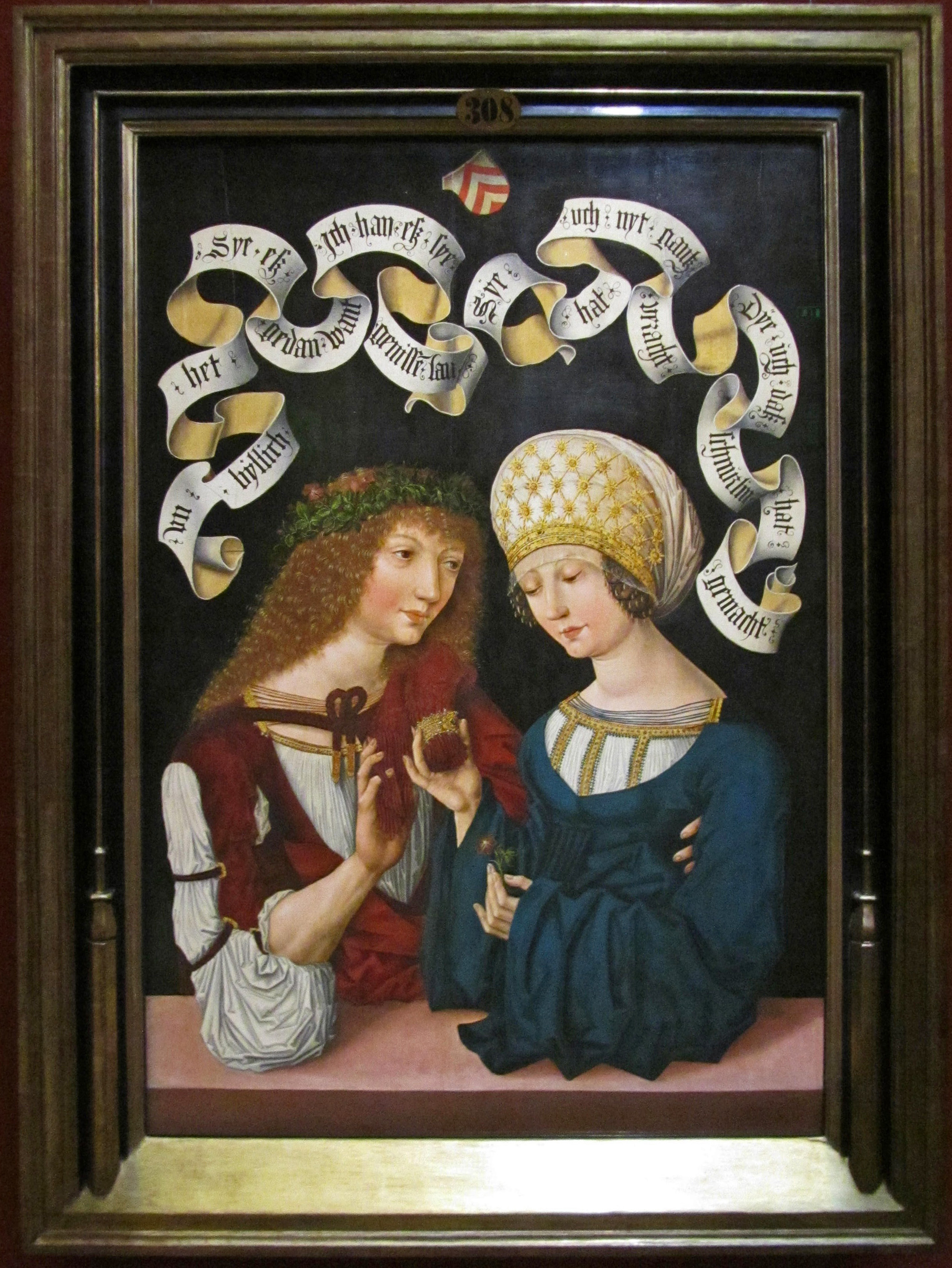 Das „Gothaer Liebespaar“, Gemälde des Meisters des Amsterdamer Kabinetts, um 1480, ausgestellt im Herzoglichen Museum Gotha (Thüringen).